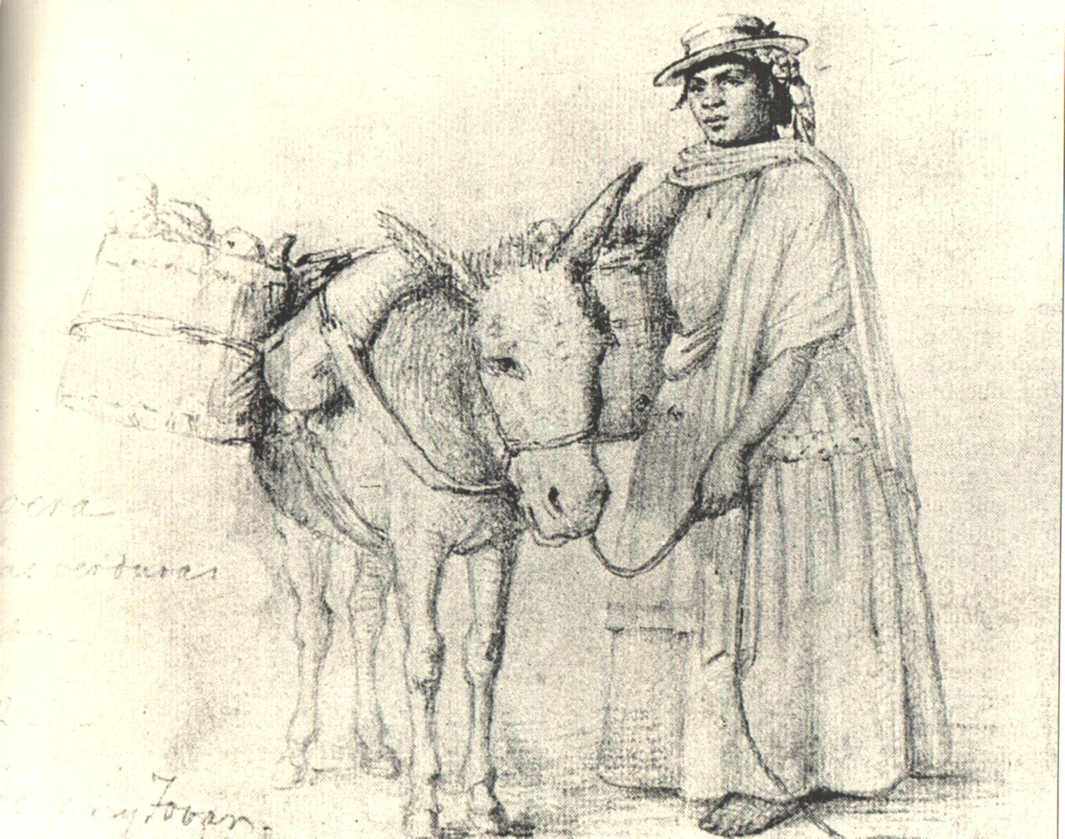 Las verduras. Estudio al lapiz. Tomada del Cojo Ilustrado, Año XII. 15 de Marzo 1903.